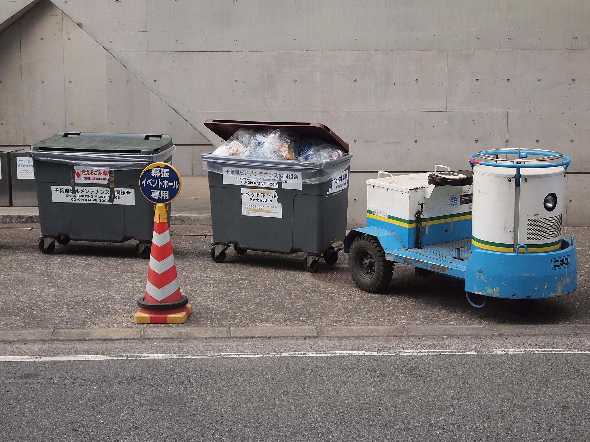 日本輸送機（ニチユ）のターレット形牽引車。列車のように複数の台車を後ろに連結して構内を走行する。写真は千葉県ビルメンテナンス協同組合所有のもので、幕張メッセでの廃棄物輸送に供される。